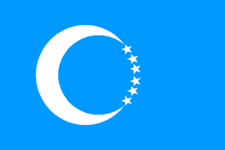 Bandera de los turcomanos iraquíes.